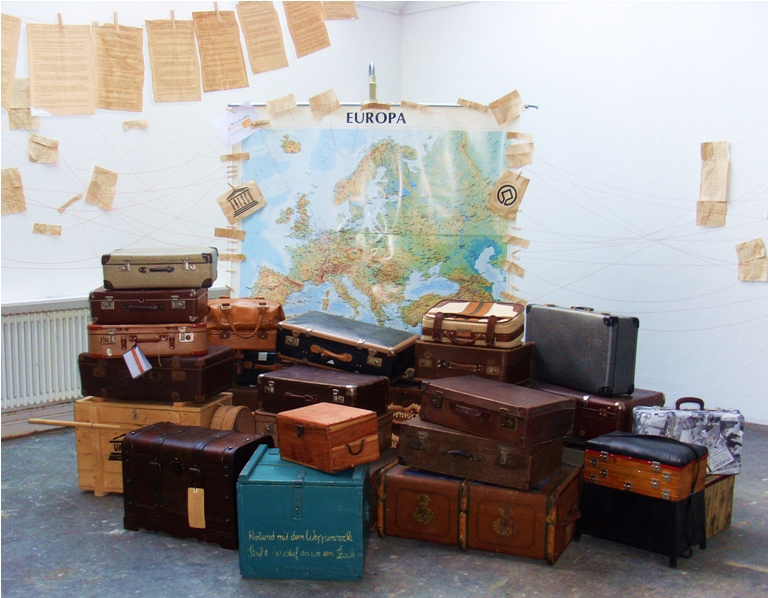 Museumcoffer